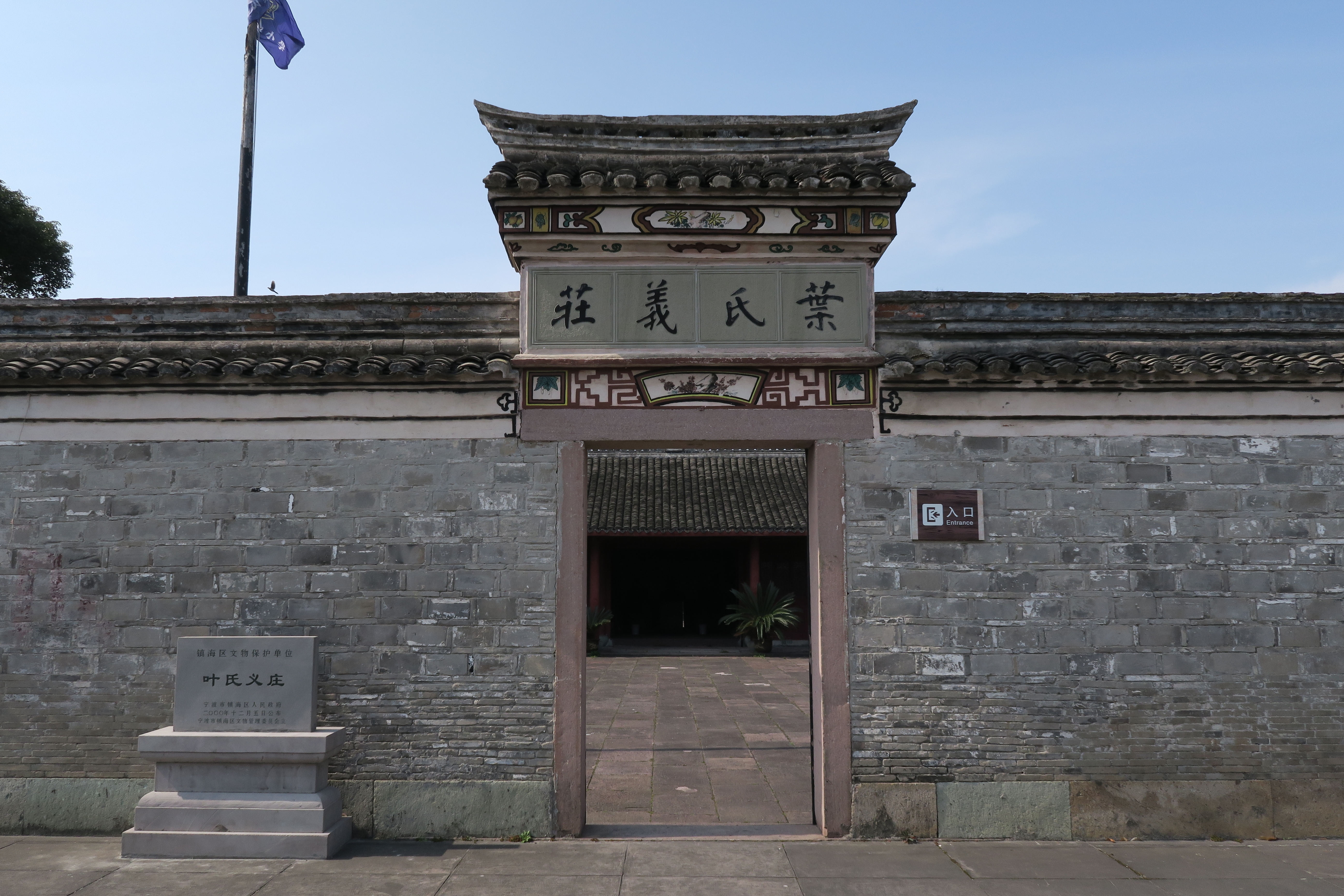 镇海叶氏义庄